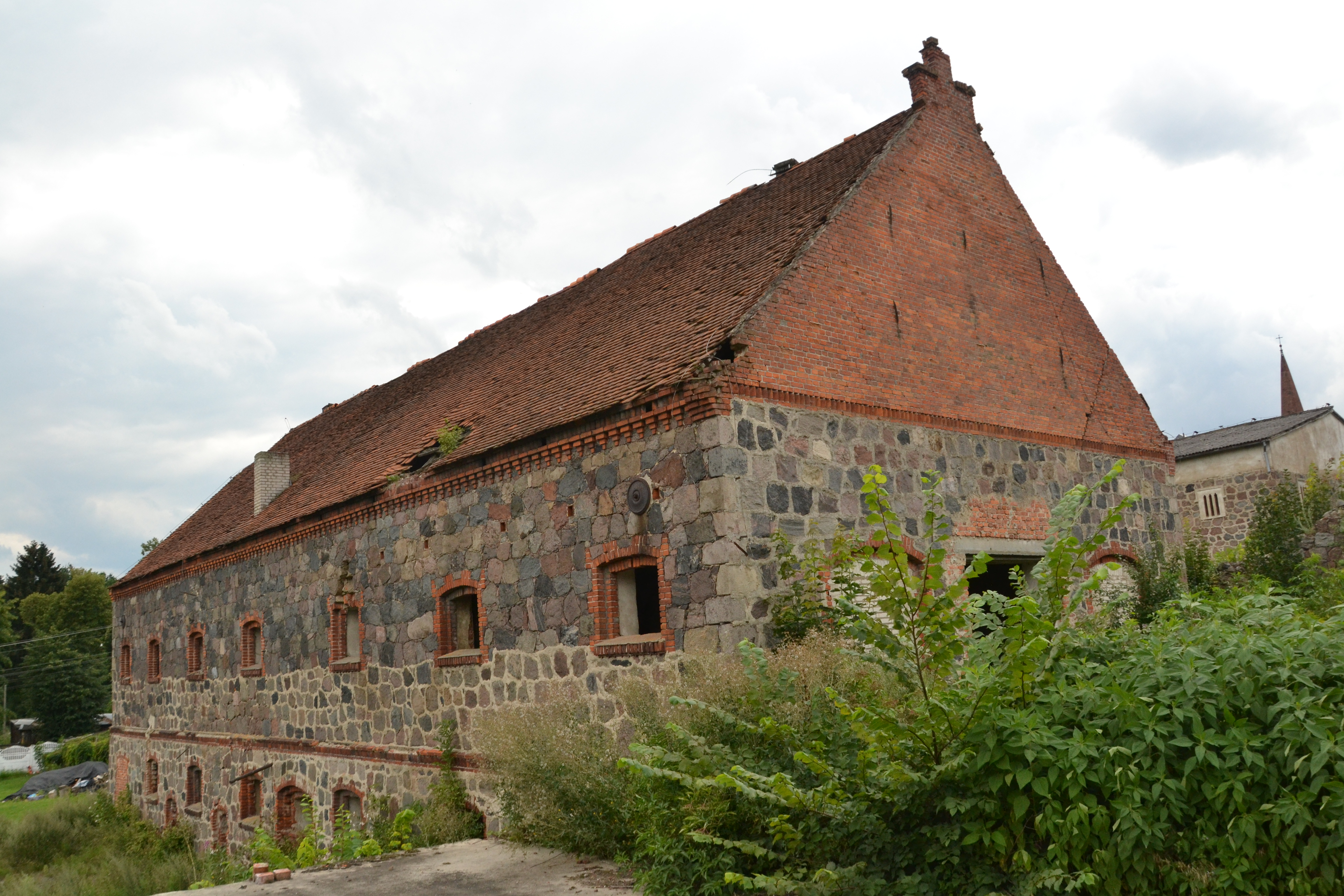 Folwark w Naroście